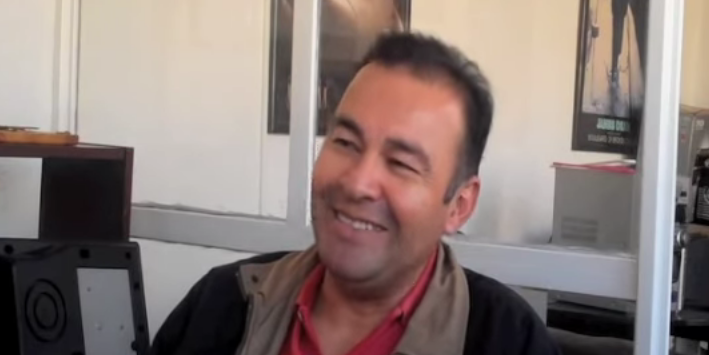 Fotograma de la entrevista realizada por Rubén Trujillo, concido como Trujo, a Mario Castañeda en 2010. Dicha entrevista está enfocada en la vida cotidiana del actor de voz.